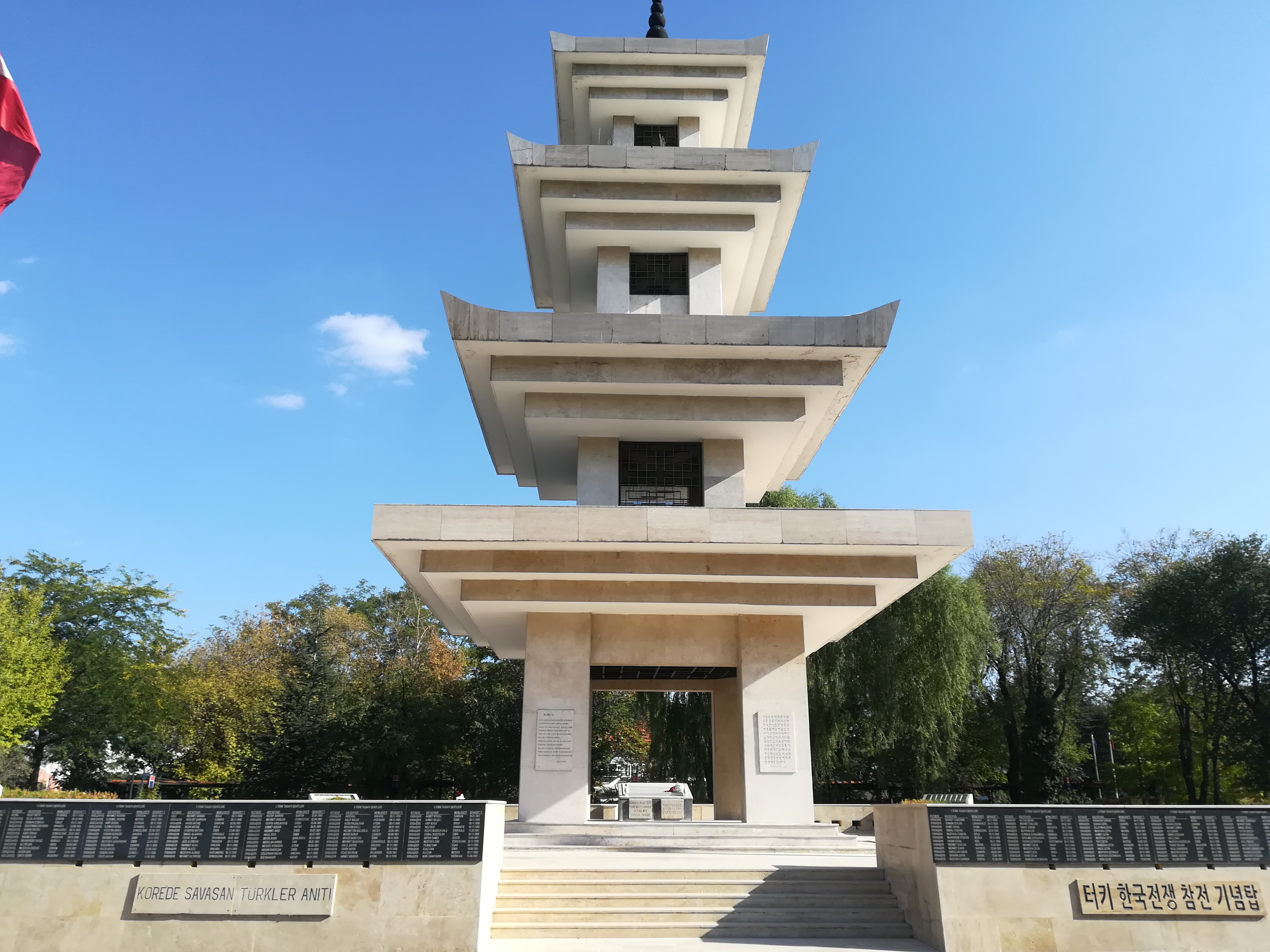 Kore savaşı Türk Anıtı